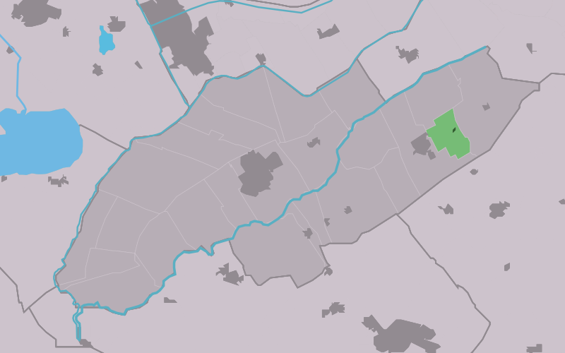 Kaartsje fan himrik fan Easterstreek